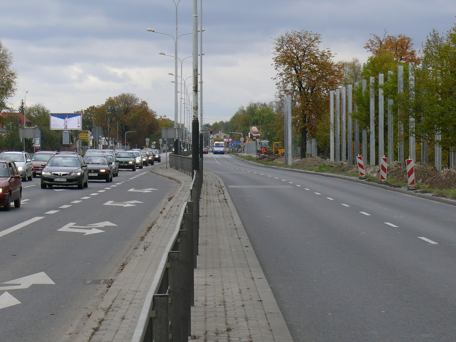 ulica Zgierska w Łodzi, fragment DK1